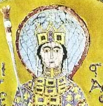 Empress Irene (image from "Pala d'Oro", Venice)